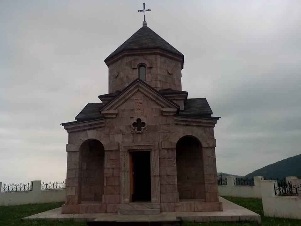 Սուրբ Գայանե եկեղեցին